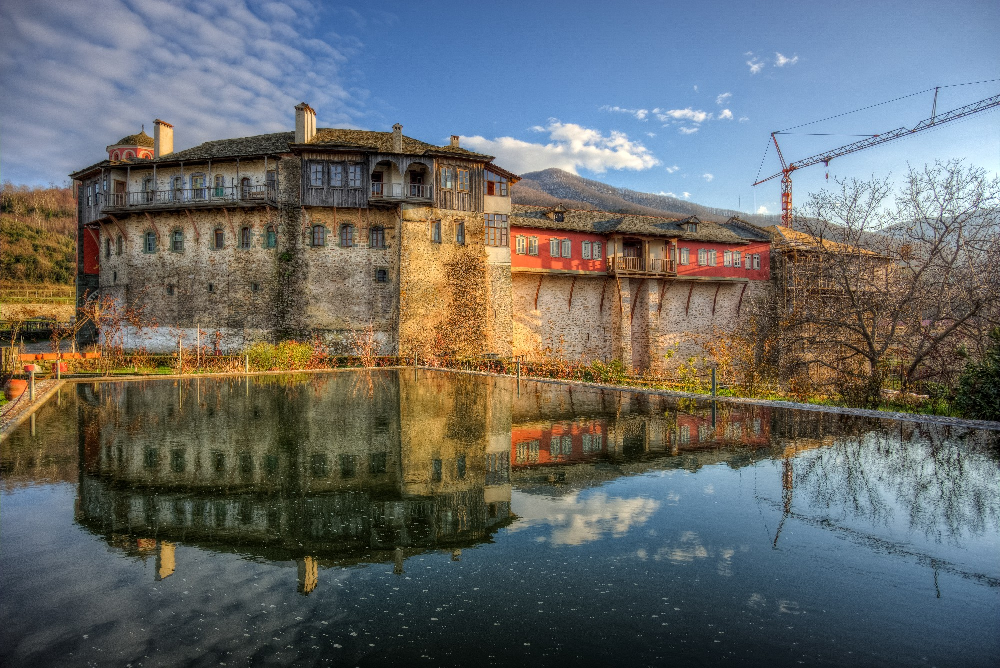 Μονή Φιλοθέου«Μονή Φιλοθέου»